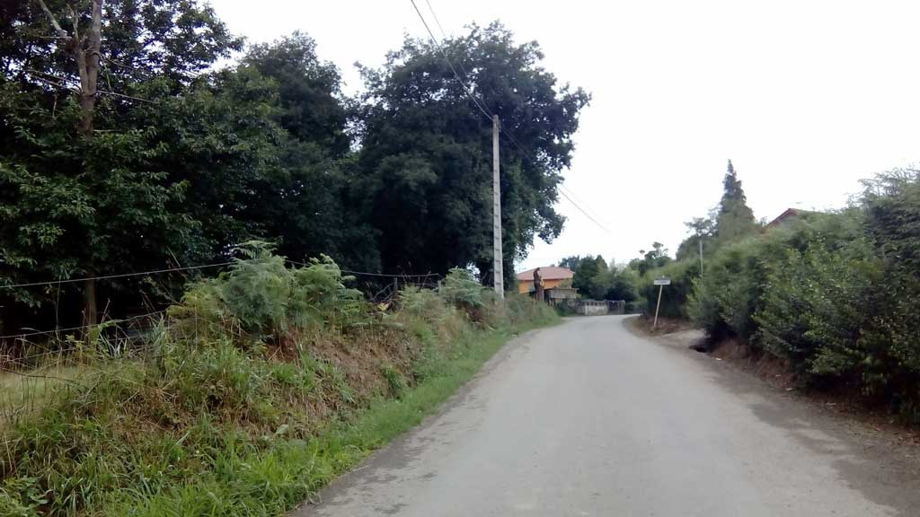 Vista do Curro, Curtis.